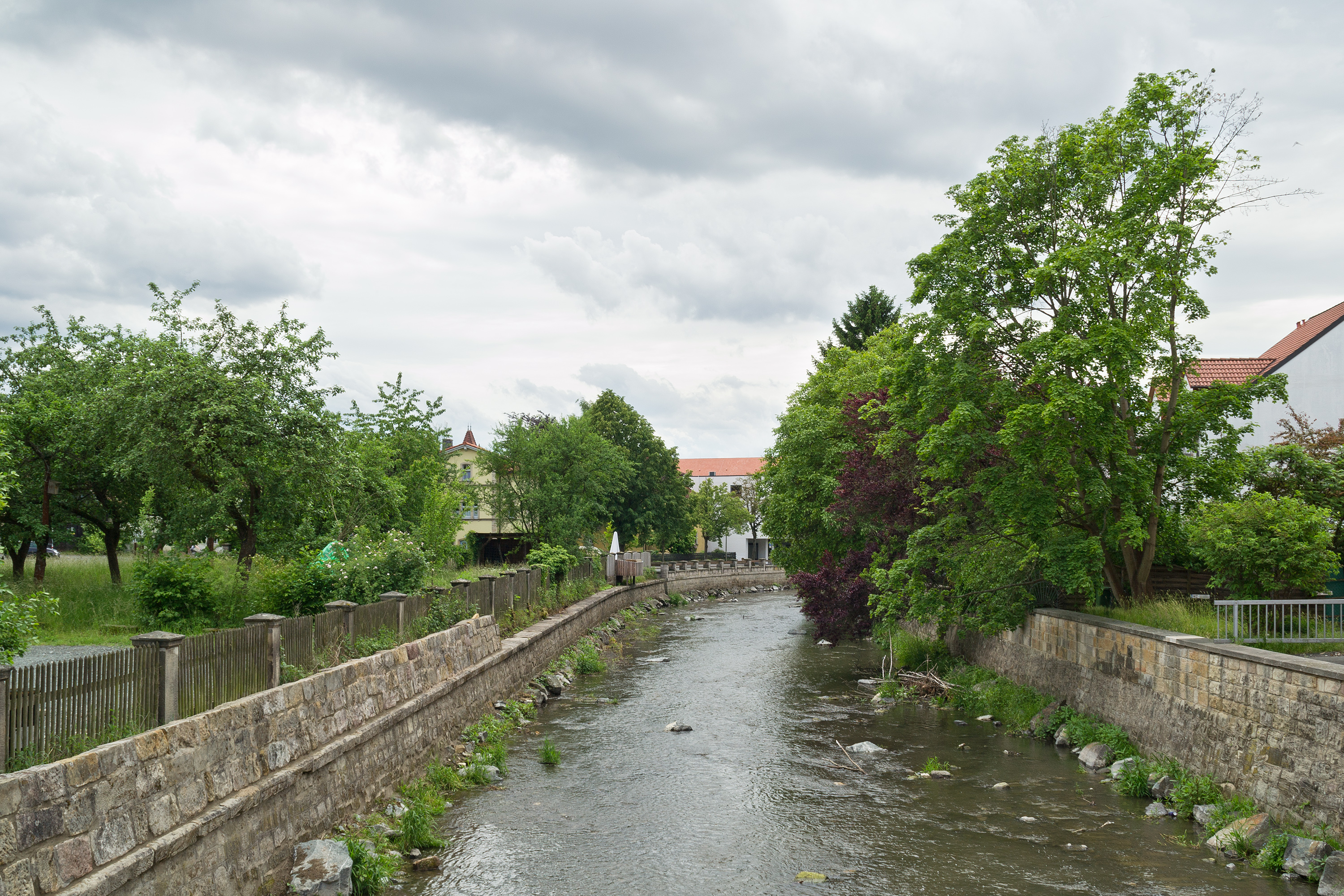 Die Kronach am Kaulanger in Kronach